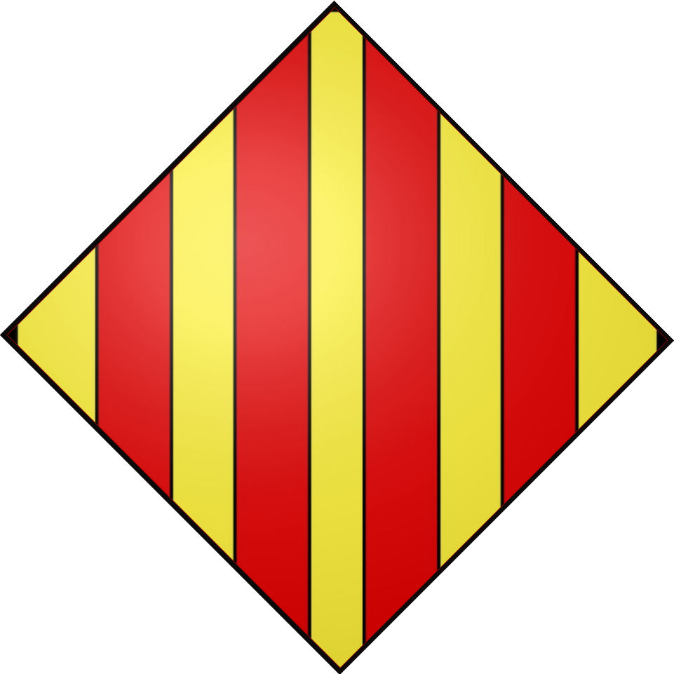 dame de merode